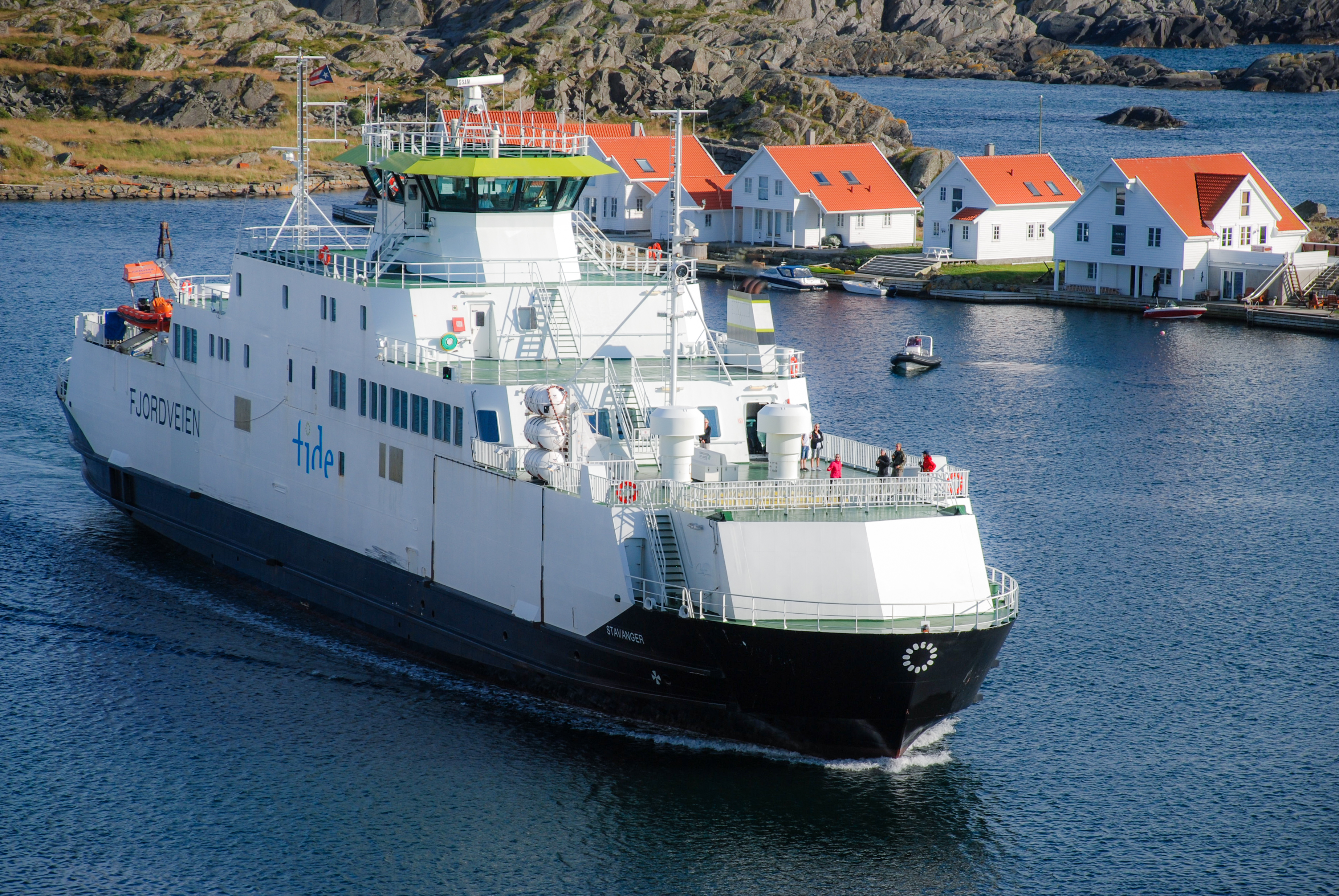 MF Fjordveien ved Skudeneshavn i 2011. Foto Harald Sætre